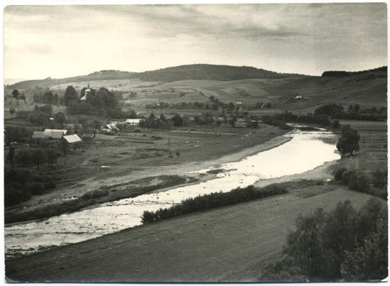 Wielopole w latach 60. XX w. Na pierwszym planie dom Malinowskich rozebrany w 1967. Widoczne słupy radiowęzła. Widok z góry Mariemont.